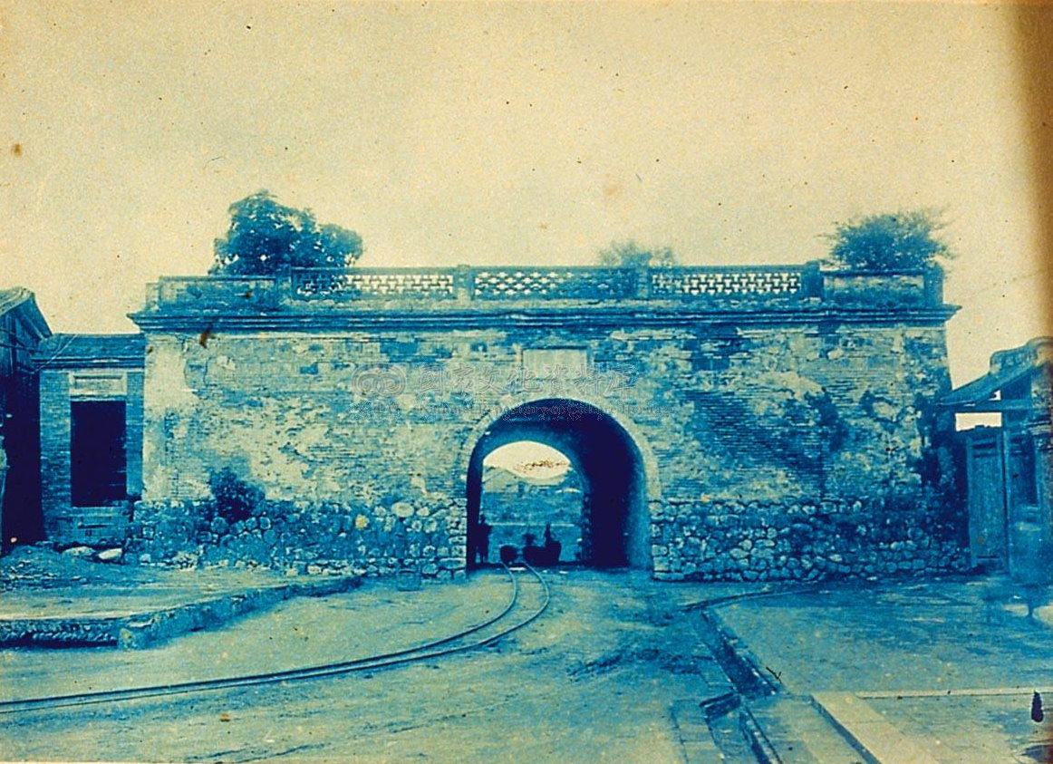 中文（台灣）: 鳳山縣新城東門。